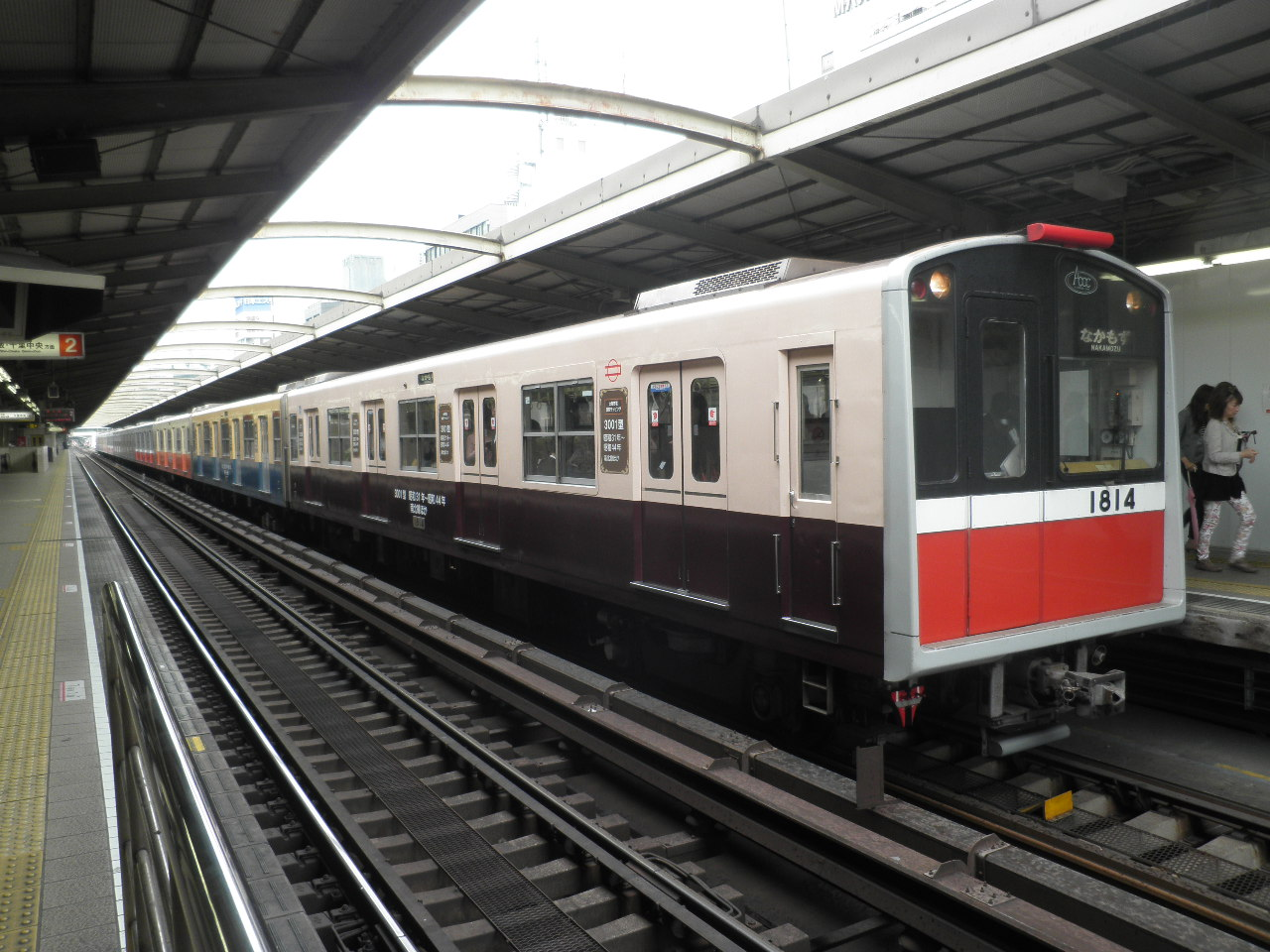 市営交通100周年記念ラッピング車、西中島南方駅